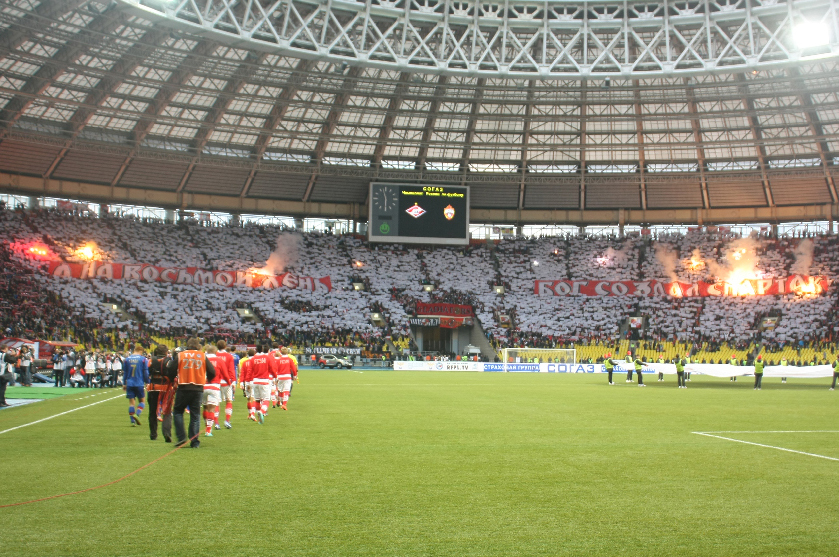 Матч "Спартак" - ЦСКА. Сезон 2012/13 годов